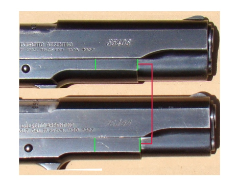 Comparacion de los diferentes tipos de frame en las sistema colt modelo 1927.